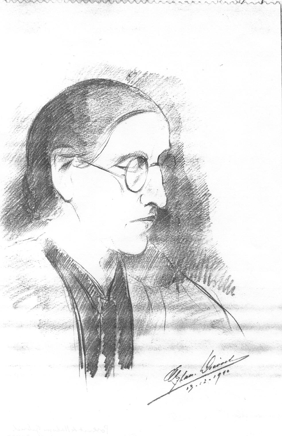 Portrait au crayon par Léon van Dievoet, de sa mère Alice Maria Valentine DEMETS, née à Bruxelles le 8 novembre 1878 et décédée à Saint-Gilles, rue Saint-Bernard, 150, le 7 novembre 1945, fille de Louis Joseph Demets et d'Anne Catherine Van Battel, épouse de Gabriel Anne Ernest Herman Léon van DIEVOET, peintre-décorateur et sgraffitiste, ancien élève de l'Académie Royale des Beaux-Arts, né à Bruxelles, Quai au Bois à Brûler, 37, le 12 avril 1875 et décédé à Saint-Gilles, rue Saint-Bernard, 150, le samedi 17 novembre 1934 à 3 heures du matin.